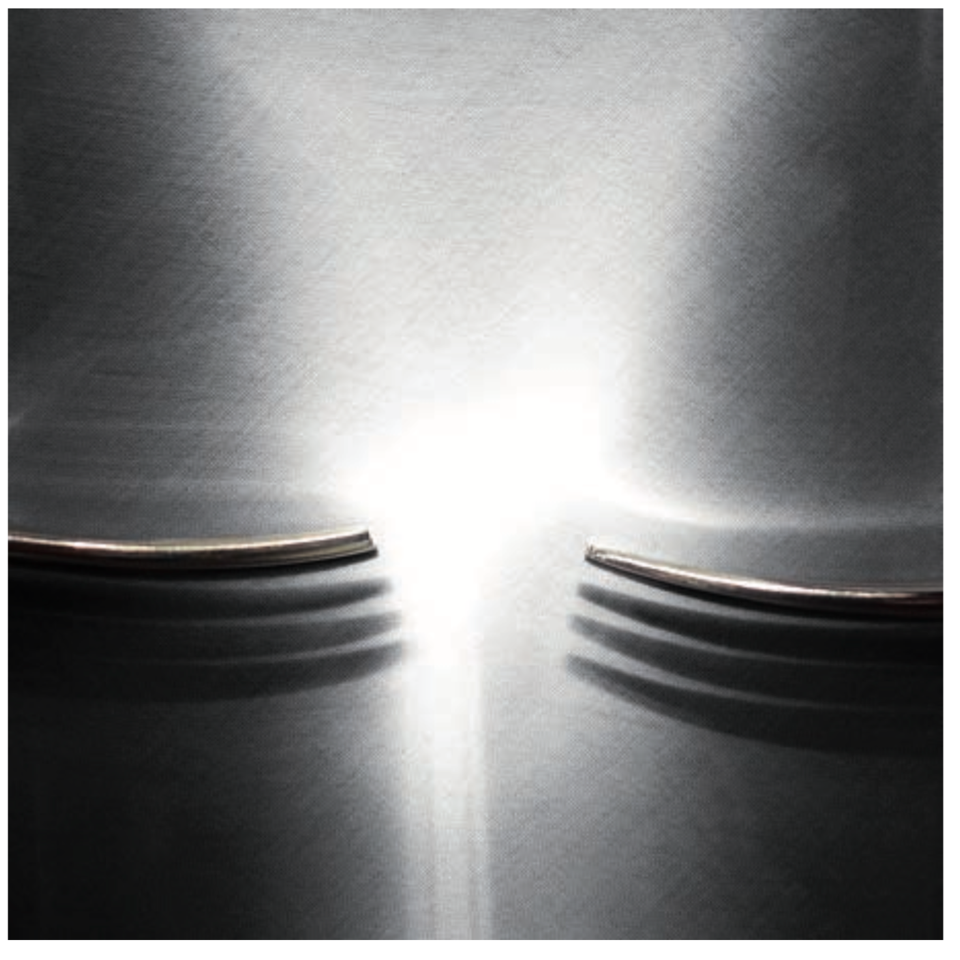 Simples Relaciones Complejas